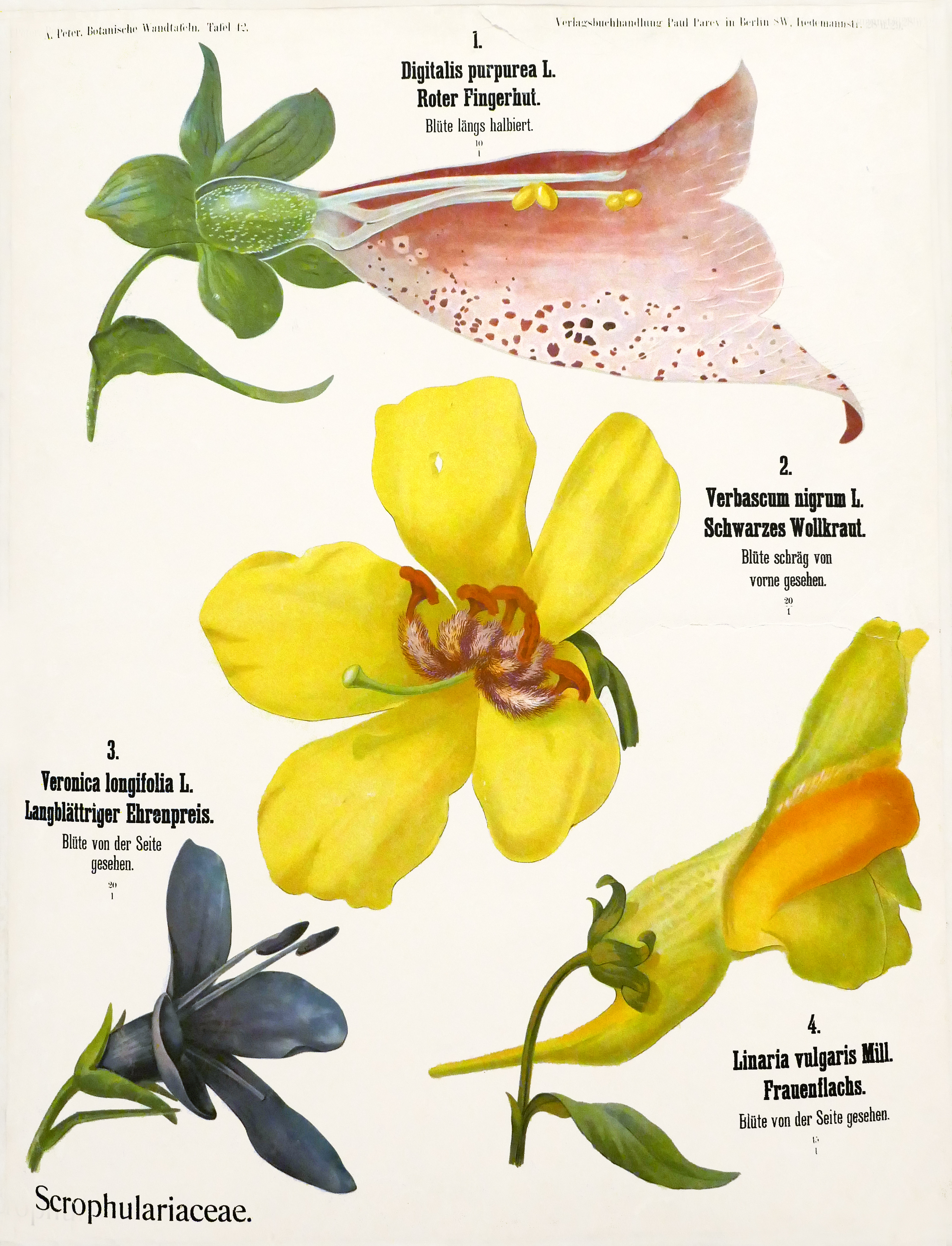 Léopold Kny et Albert Peter (fabricants). Planches botaniques murales ou Botanische Wandtafeln. Verlagsbuchhandlung Paul Parey. Berlin. Fin du 19e s. début du 20e s. Herbier de l'université de Strasbourg. Exposition Laboratoire d'Europe Strasbourg, 1880-1930 au Musée d'art moderne et contemporain de Strasbourg.